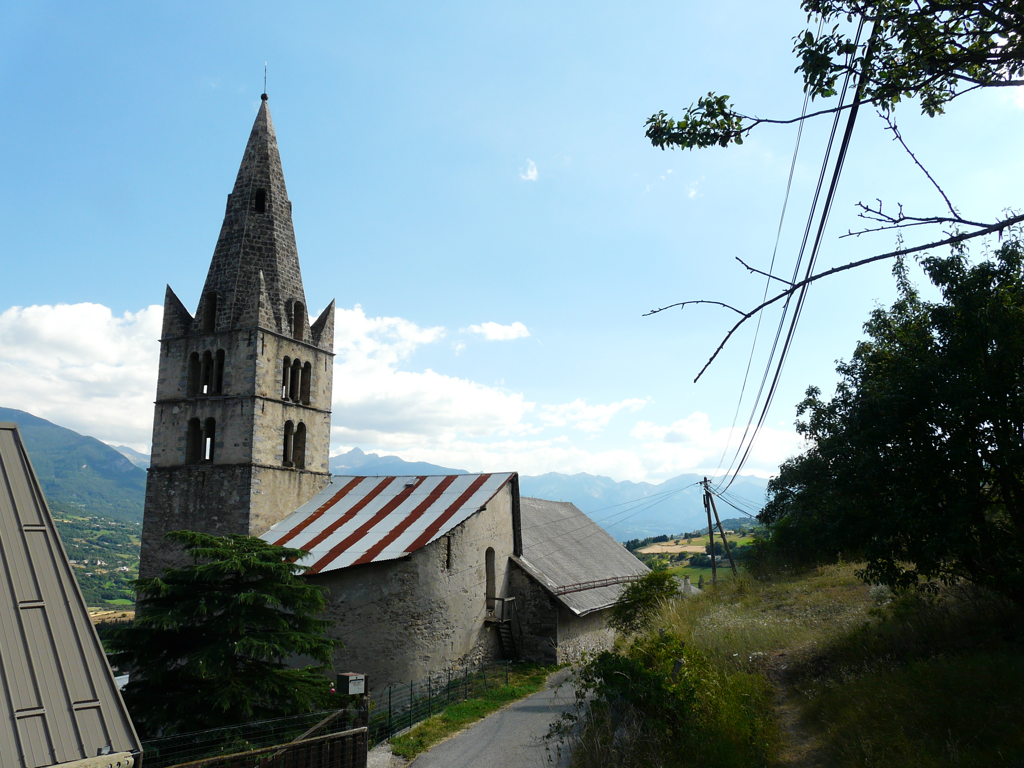 Église Saint-Marcellin de Châteauroux-les-Alpes This building is en partie classé, en partie inscrit au titre des Monuments Historiques. .